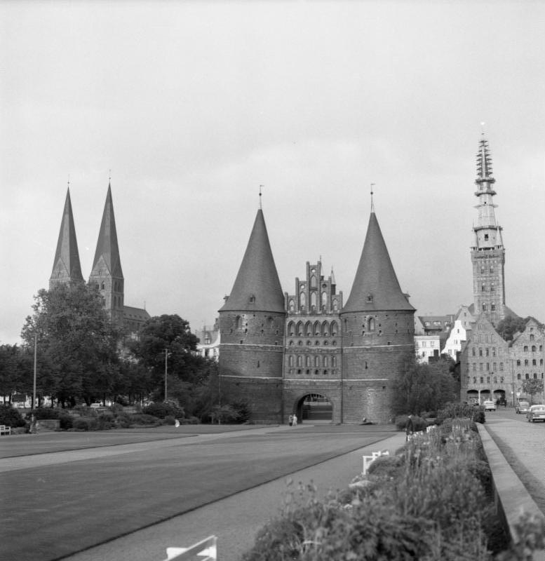 10 jähriges Bestehen des BGS: Stadtaufnahmen Lübeck